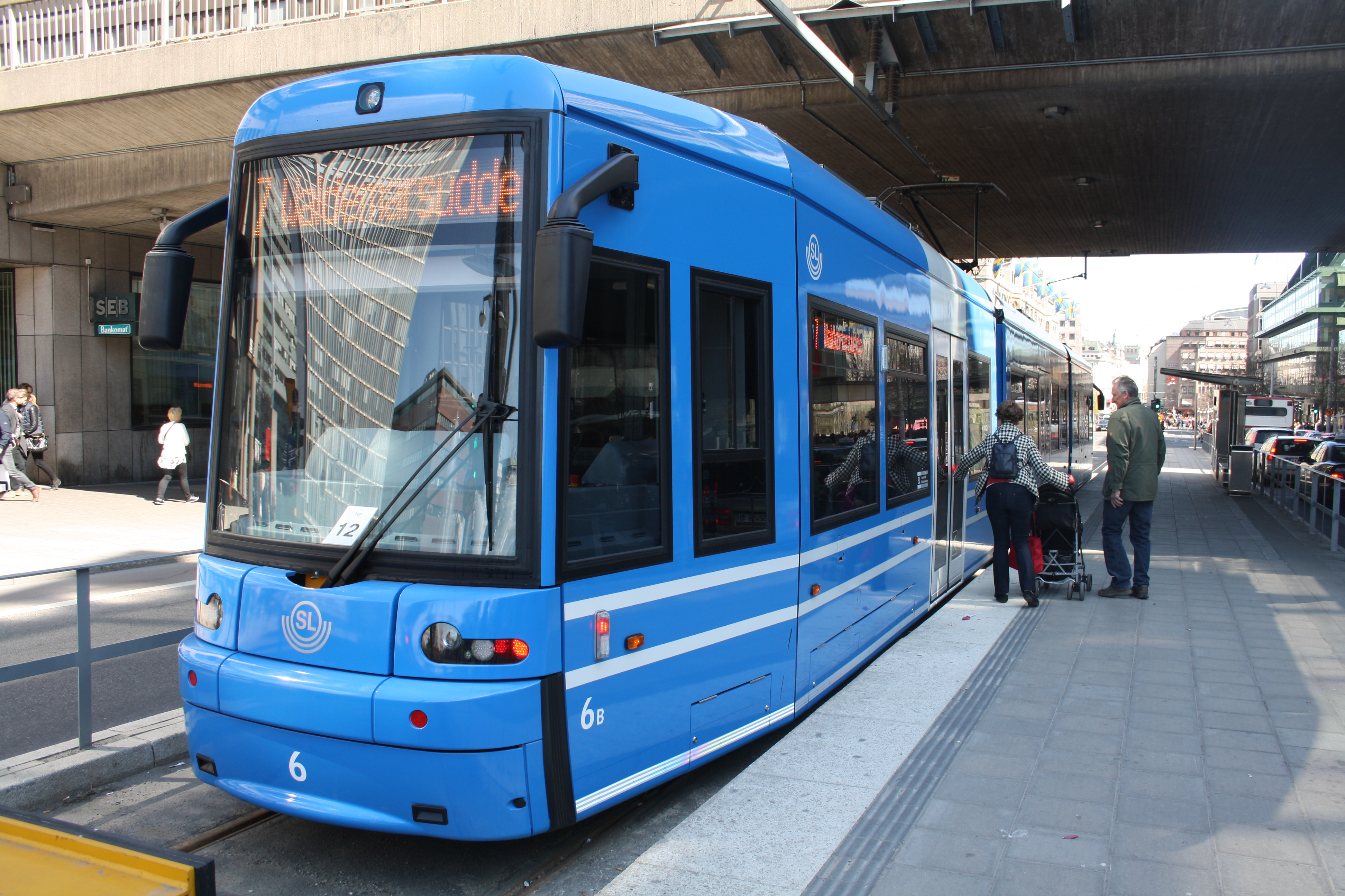 Blåa Spårväg City